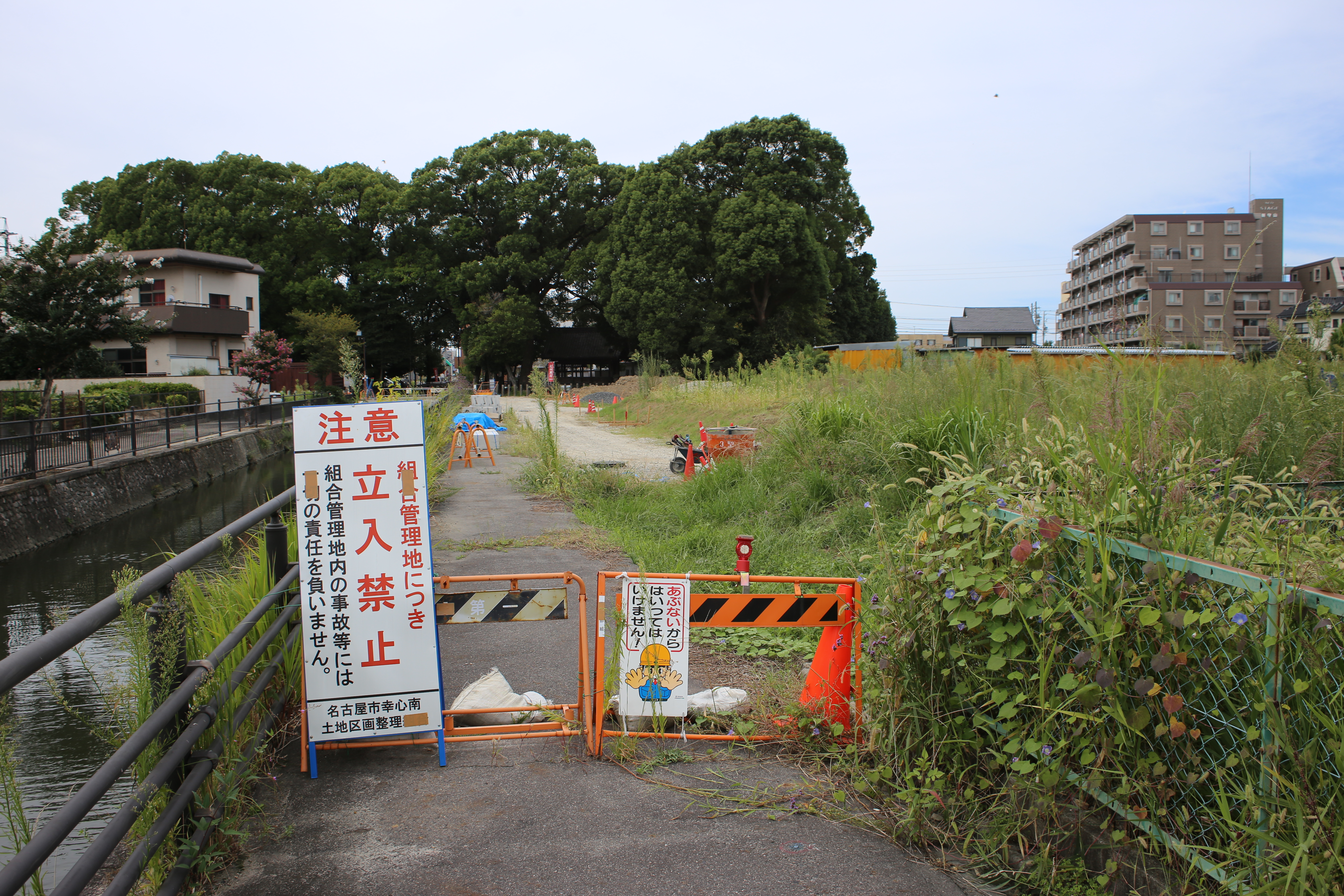 名古屋市守山区幸心一丁目の名古屋市幸心南土地区画整理事業地の様子